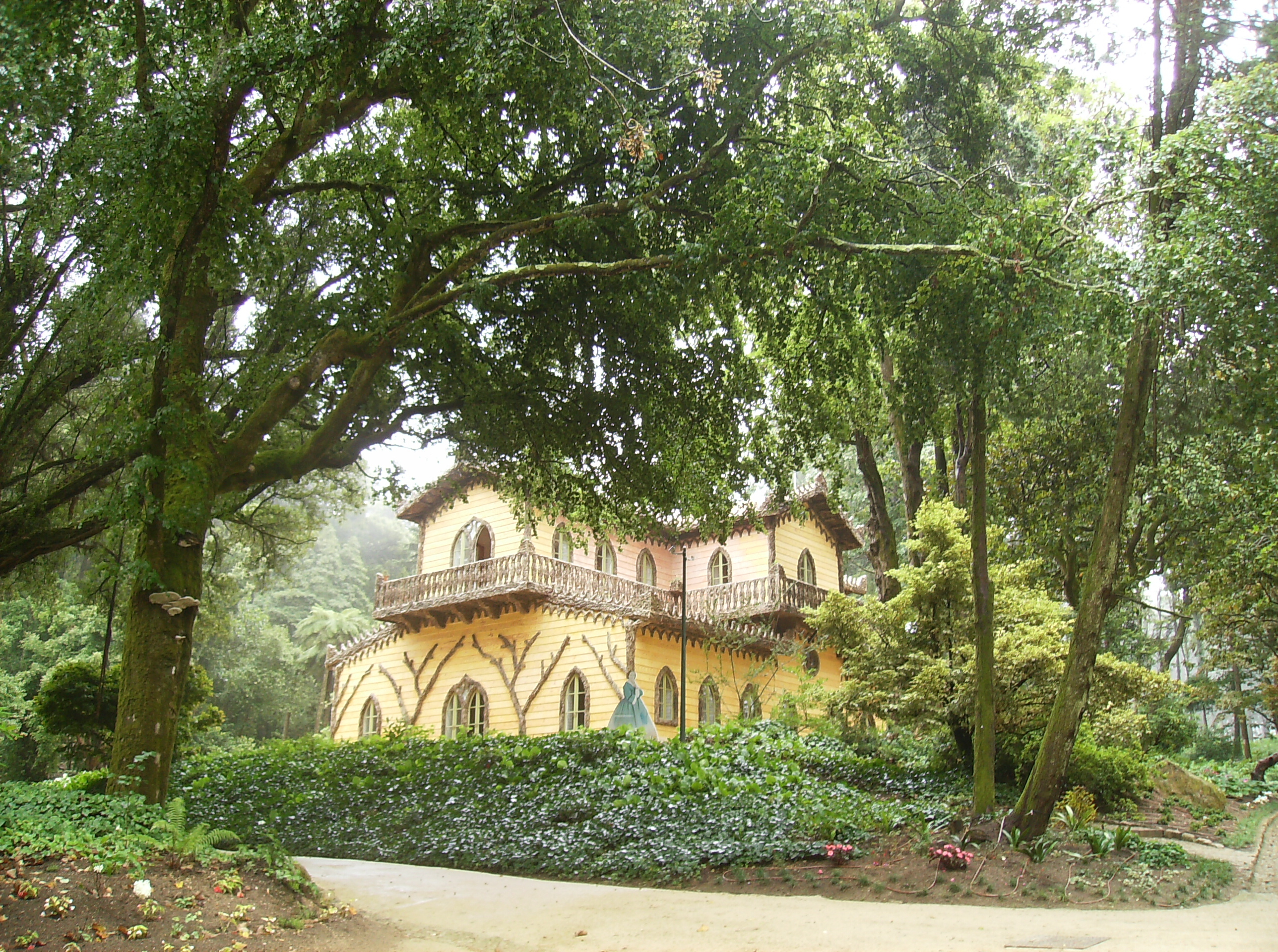 Jardim da Condessa d1Edla - Sintra This file was uploaded for Wiki Loves Monuments in Portugal with the unique identifier 6666431.